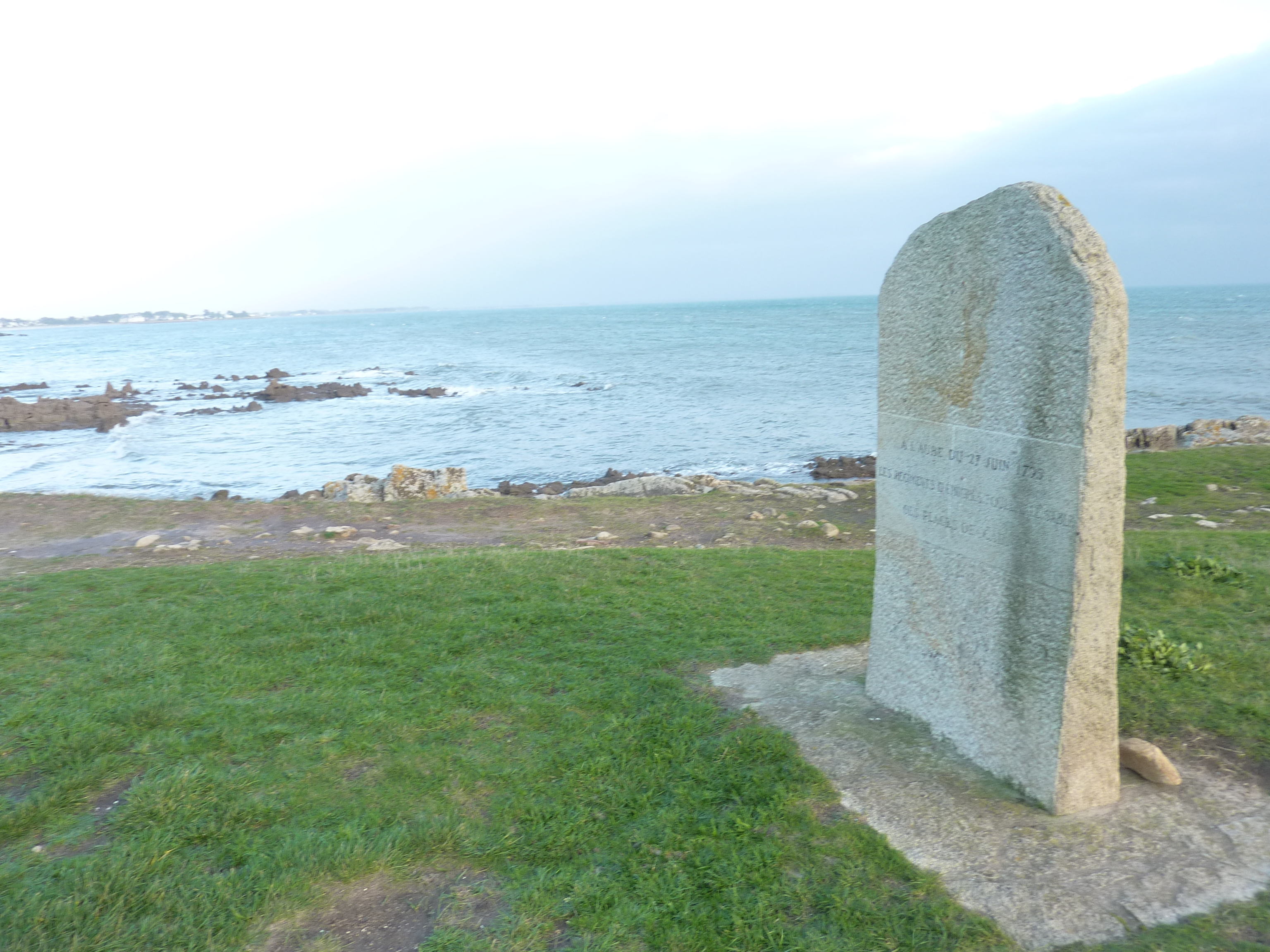 Carnac : monument commémoratif du débarquement des Emigrés le 27 juin 1795 (situé sur la pointe entre les plages de Légenès et Ty Bihan)